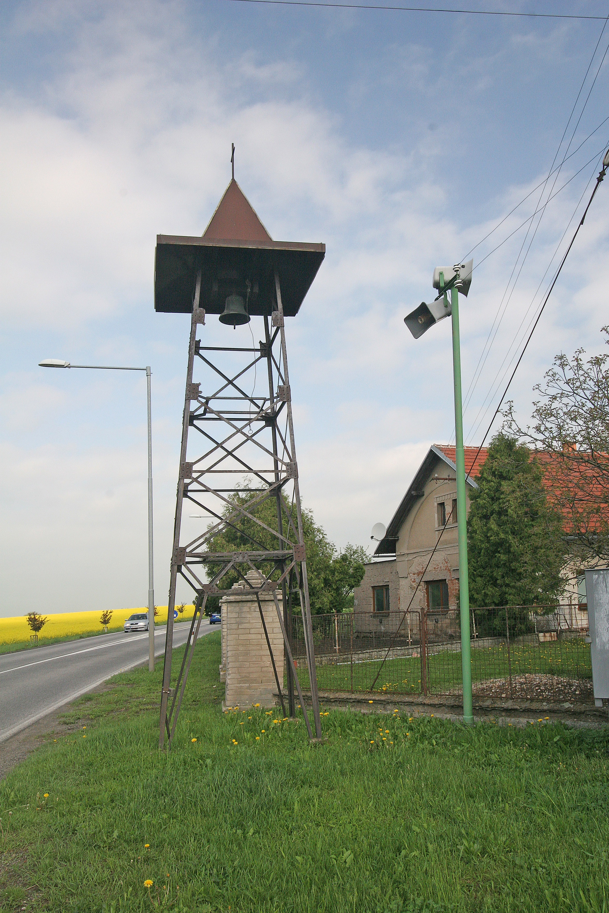 Voleč zvonička